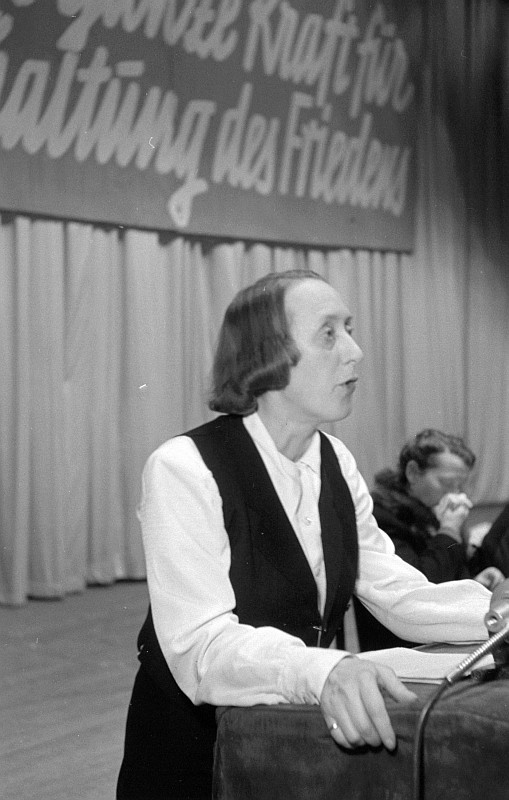 Original image description from the Deutsche FotothekGreta Kuckhoff, Haber (München), Dr. Barbara v. Renthe (Berlin)